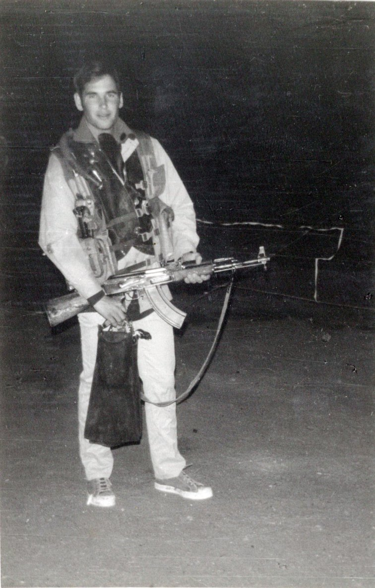 לוחם היחידה עמי שנון